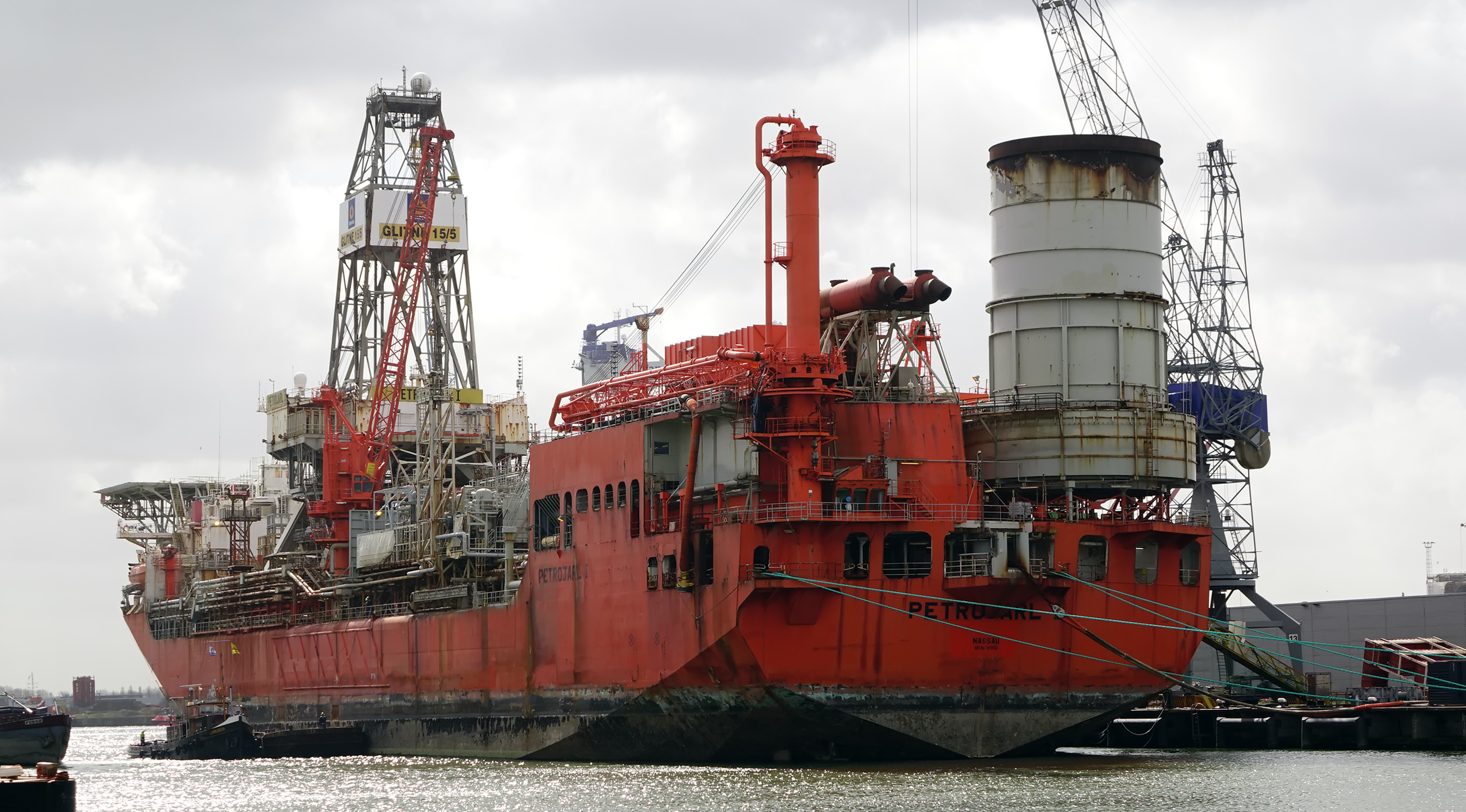 Wiltonhaven 1-4-2015